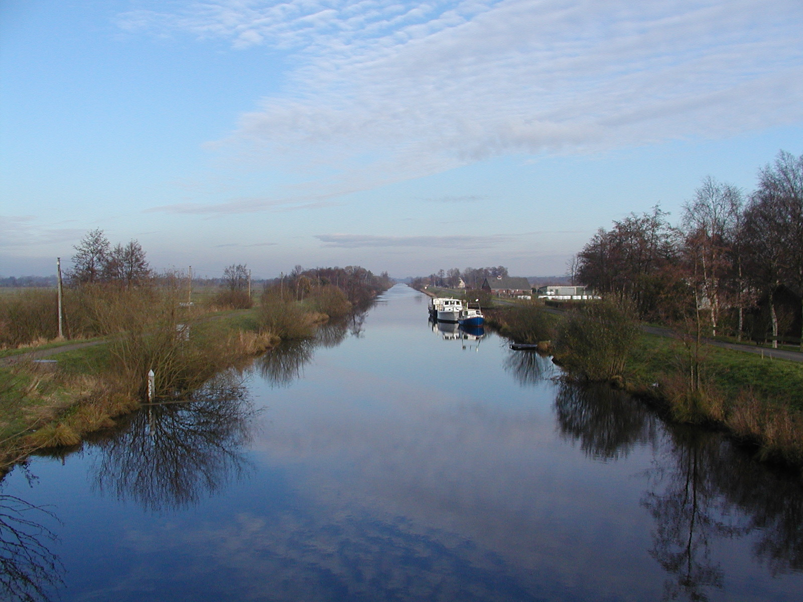 Der Kanal an der Schöpfwerkstraße